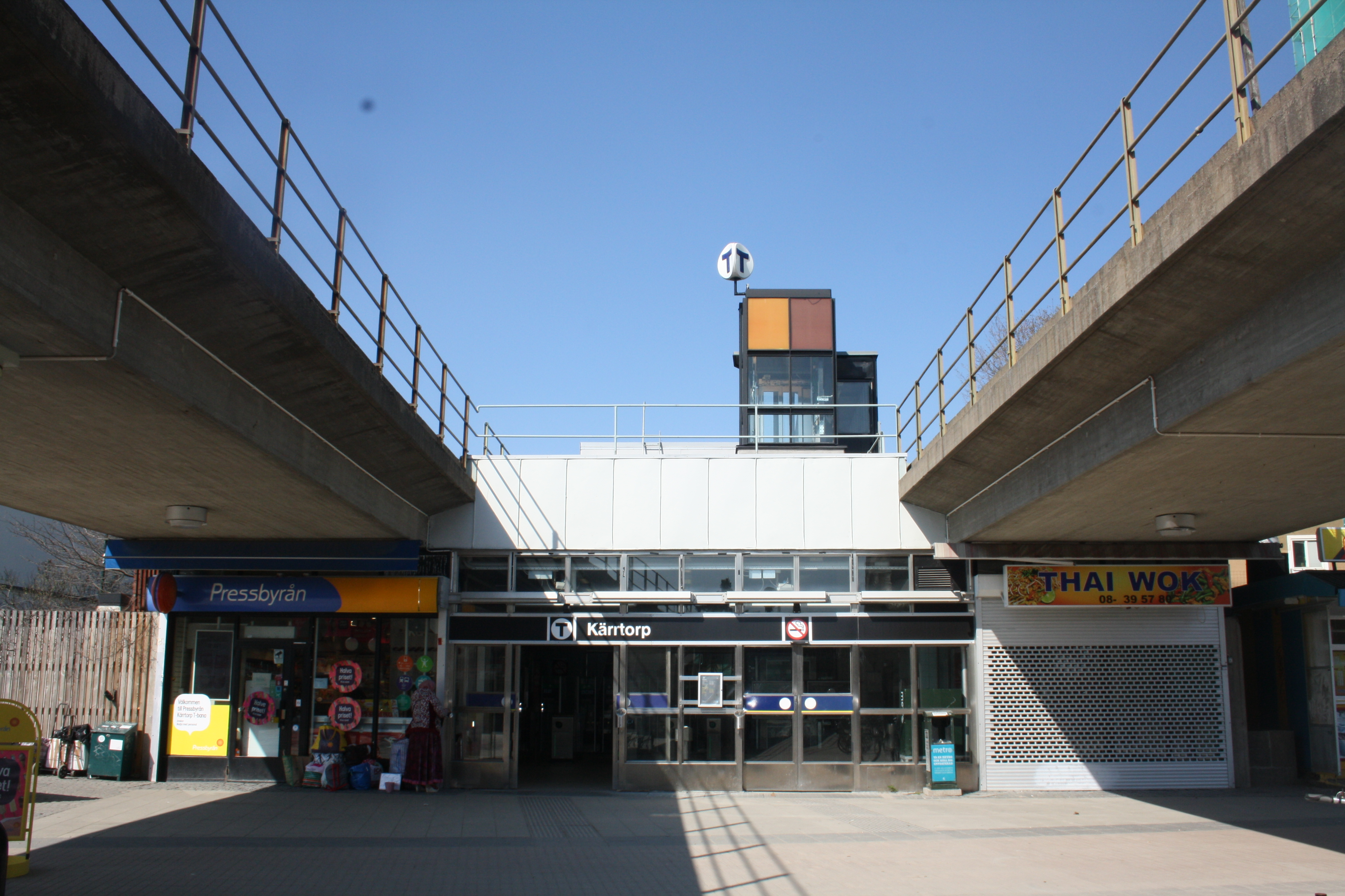 Kärrtorps tunnelbana